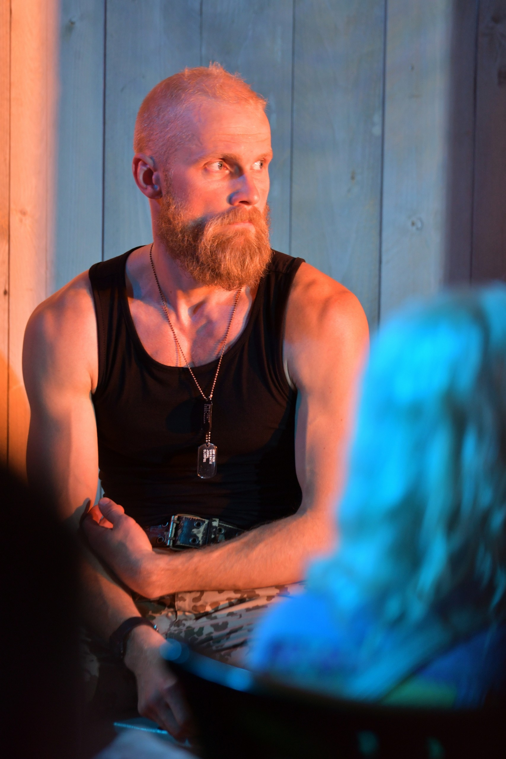 Kristo Viiding etenduses "“Praegu pole aeg armastamiseks”